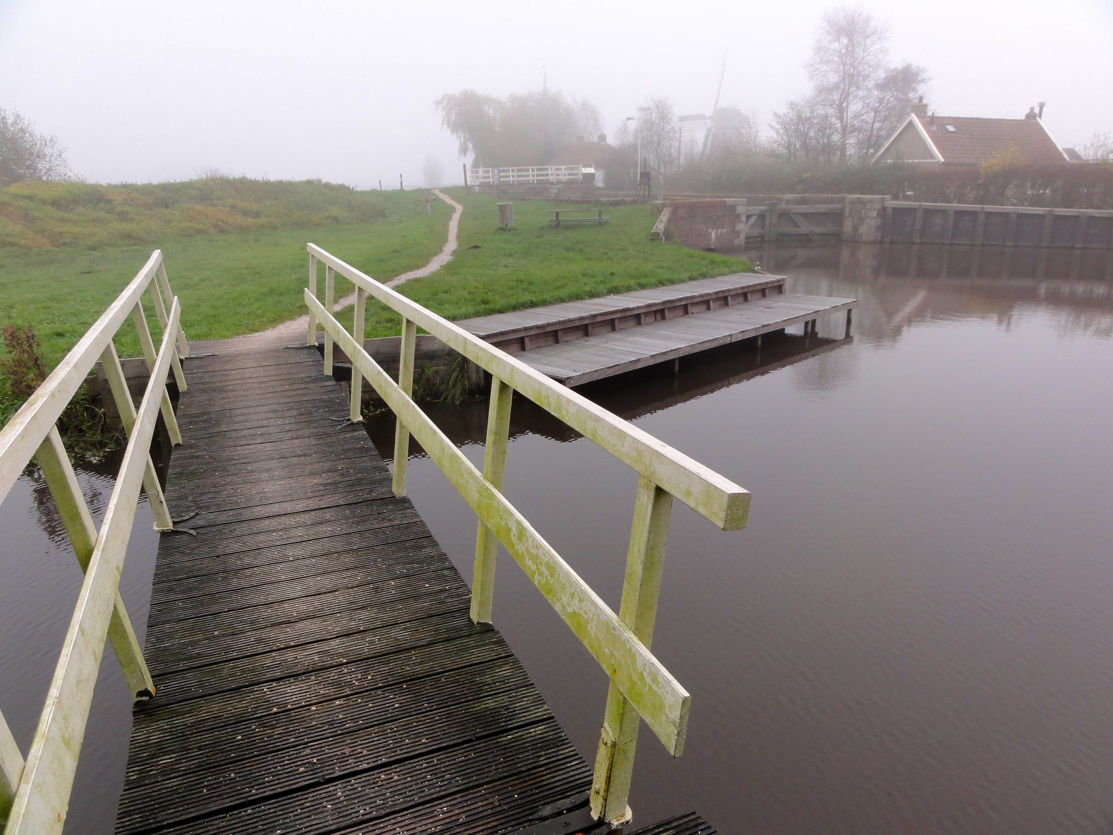 Scheenesluis bij de Scheene in de Rottige Meenthe en de Helomavaart, op de achtergrond de windmolen de Rietvink